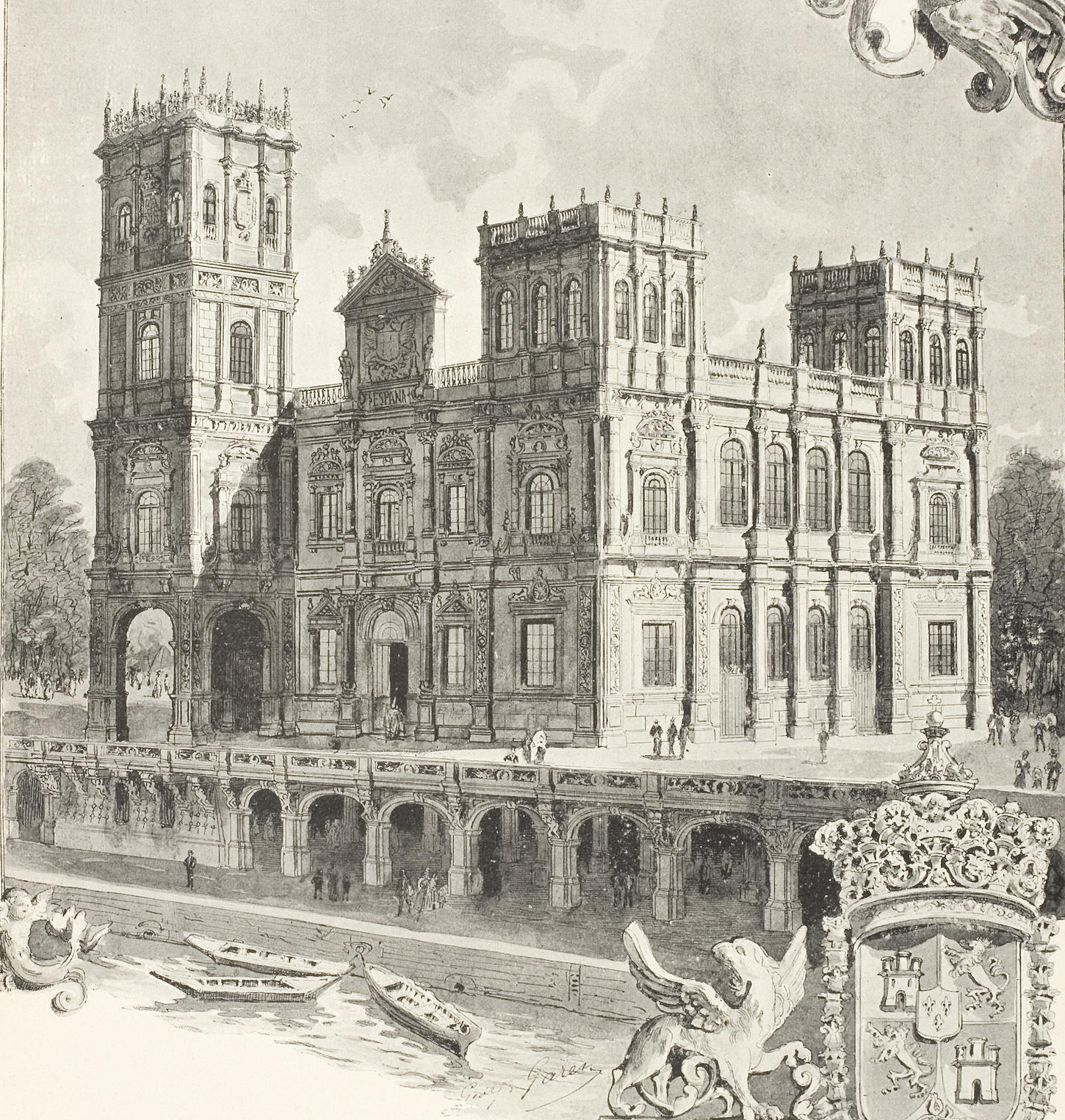 Le Pavillon royal de l'Espagne.